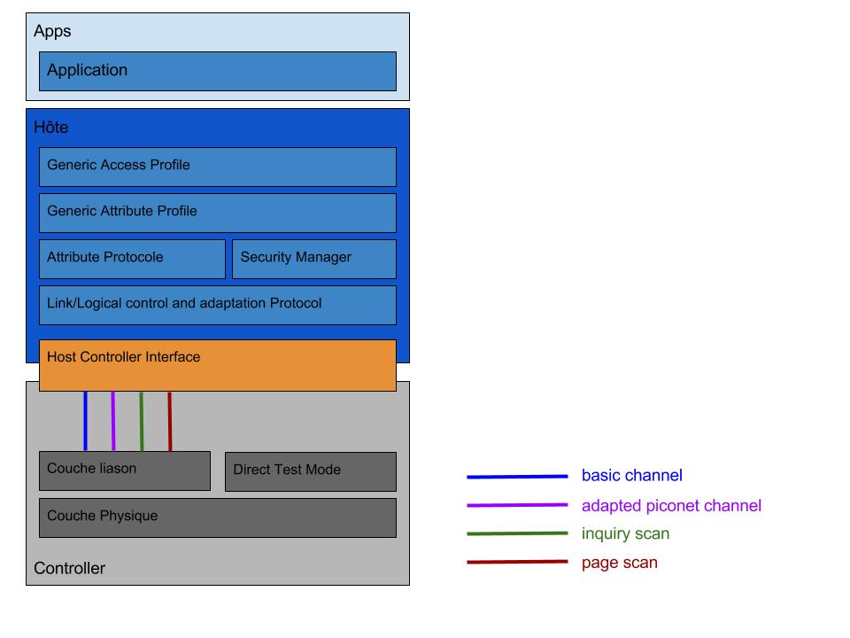 Liaison entre les différentes couches et des protocoles du système bluetooth